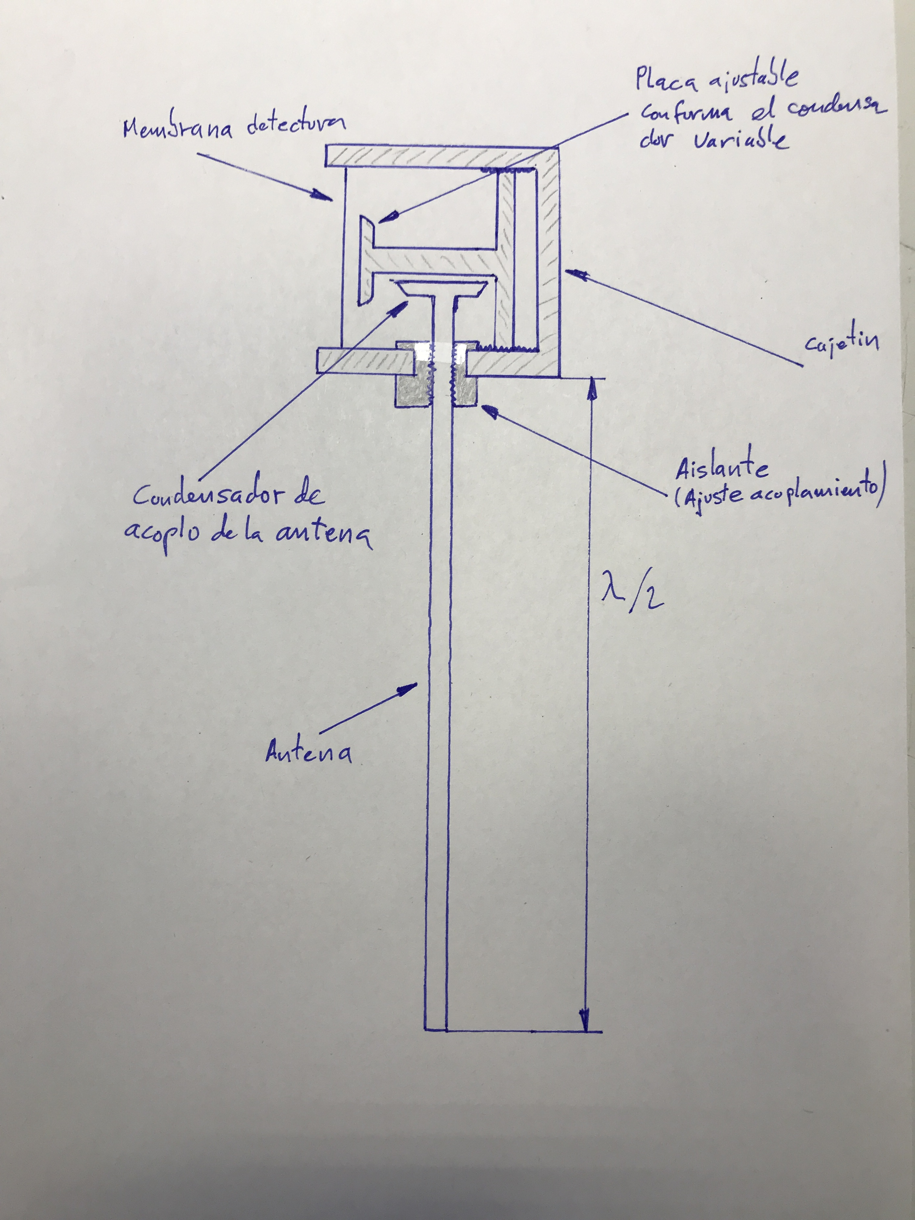 Representación de una sección de un envibrador muy similar al conocido por el nombre de "The thing" (La cosa).